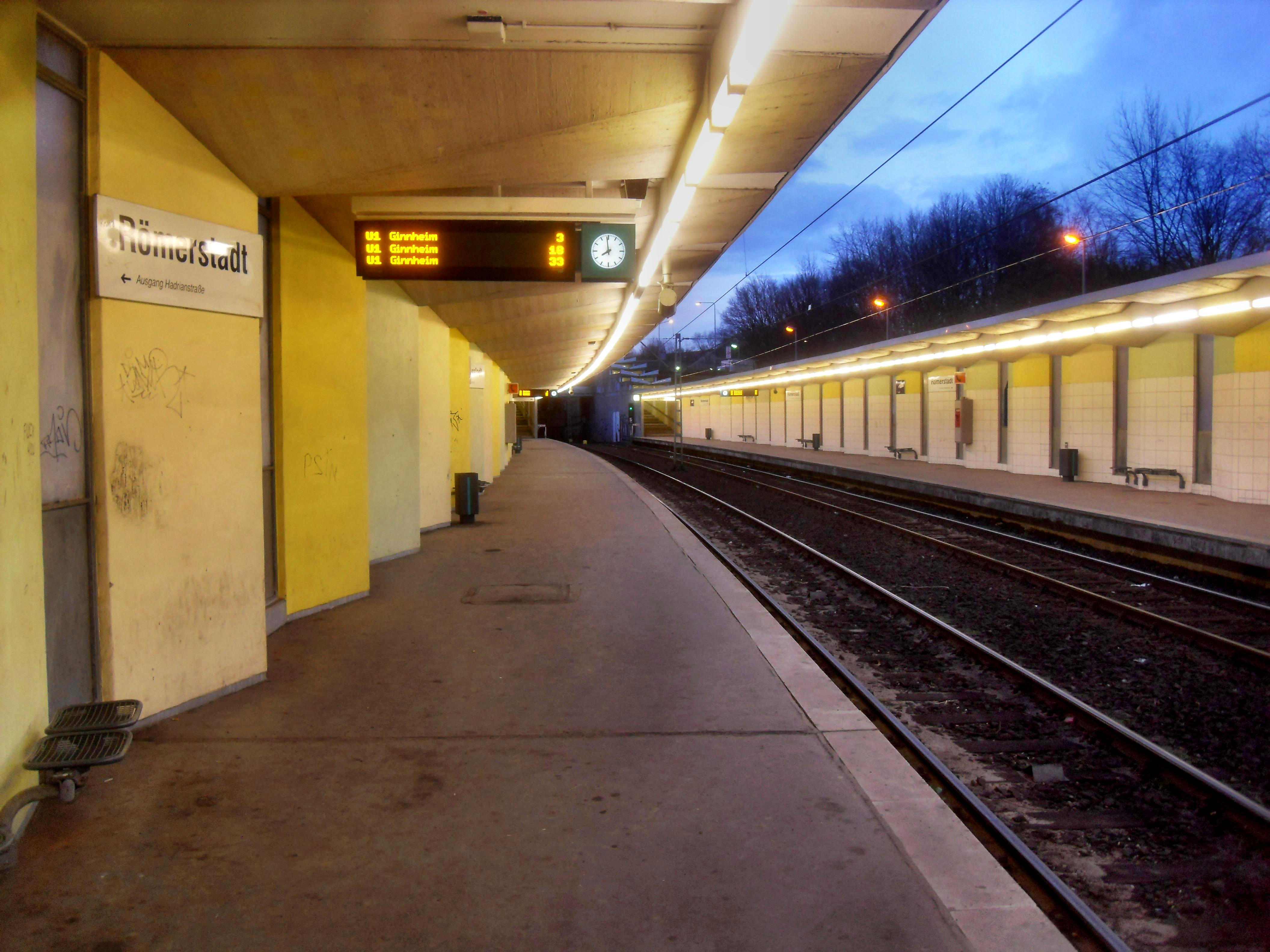 Bahnsteig des U-Bahnhofs Römerstadt (Richtung Ginnheim) der U-Bahn Frankfurt auf der Linien U 1 in Frankfurt-Heddernheim in Hessen (Deutschland)